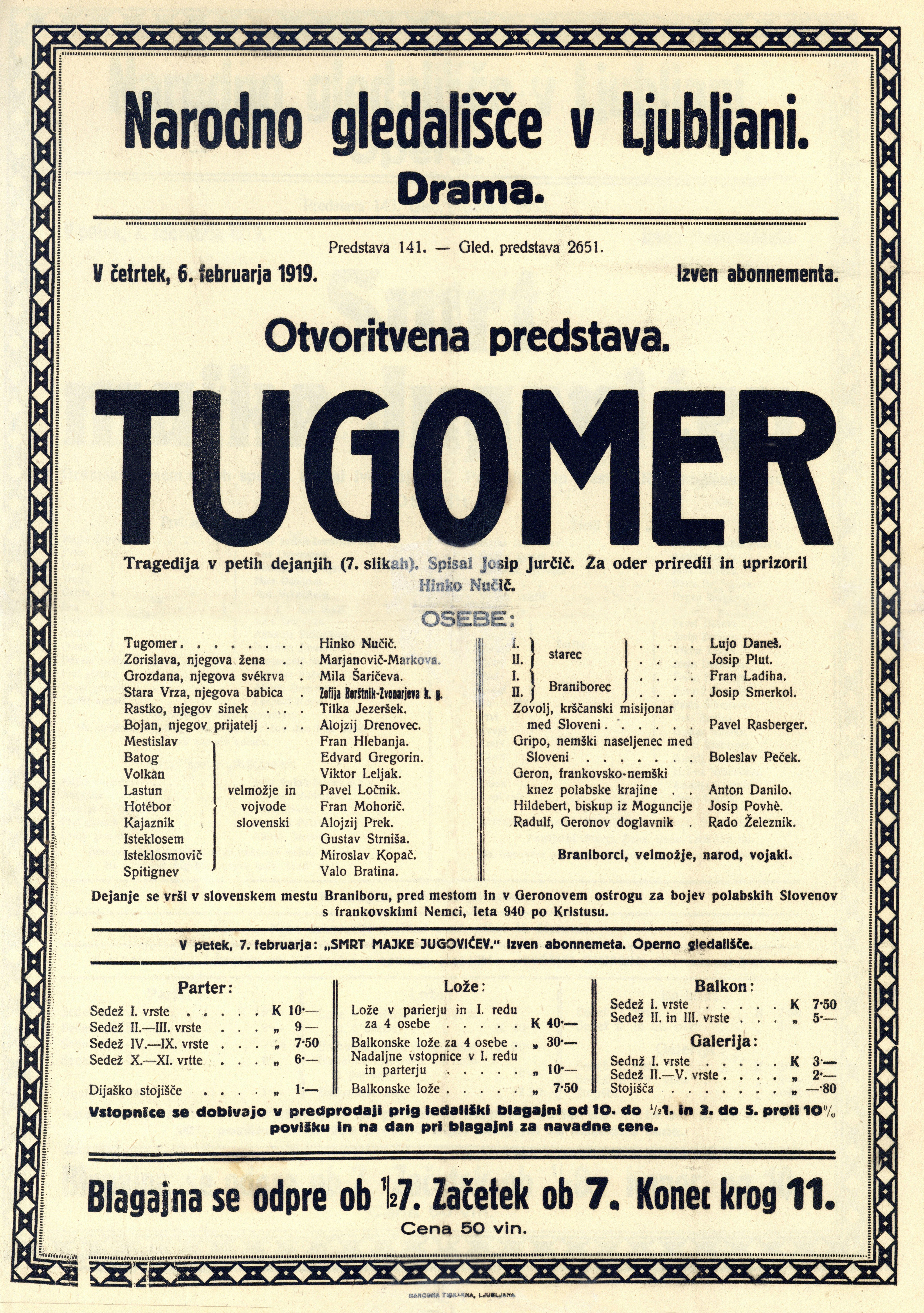 Plakat za predstavo Tugomer v Narodnem gledališču